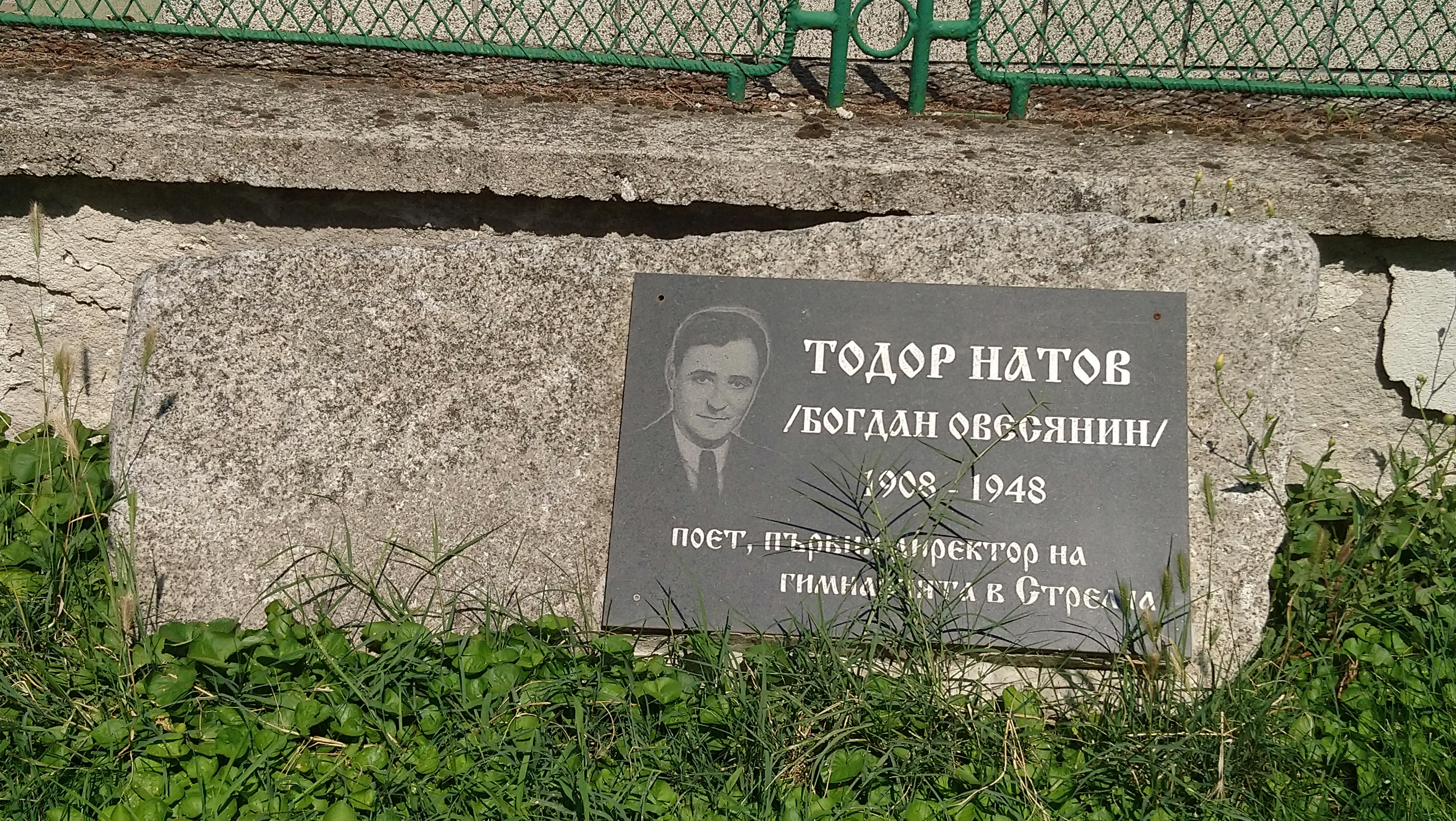 Новата паметна плоча на поета Богдан Овесянин, Стрелча